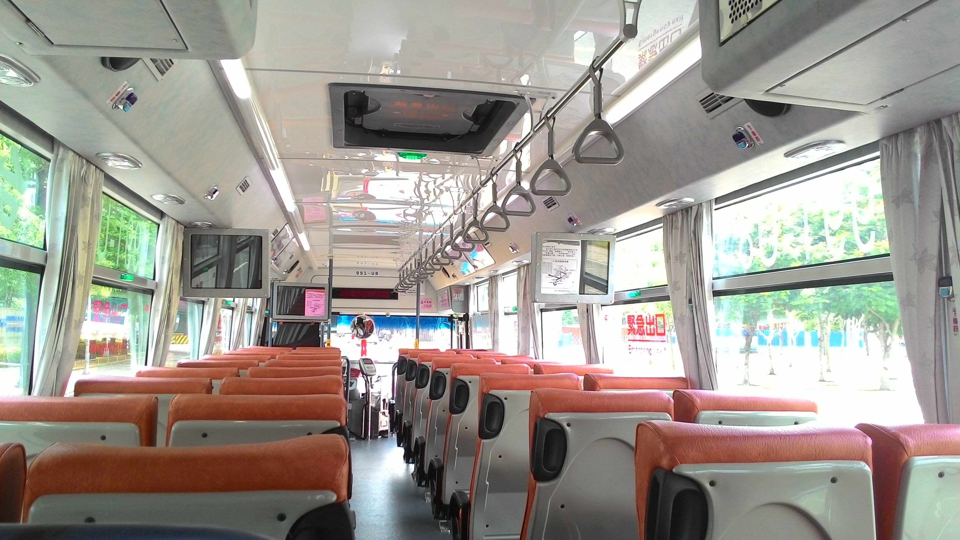 中文（台灣）: 2015〈2015〉 HINO RK8JRVA（固亞）